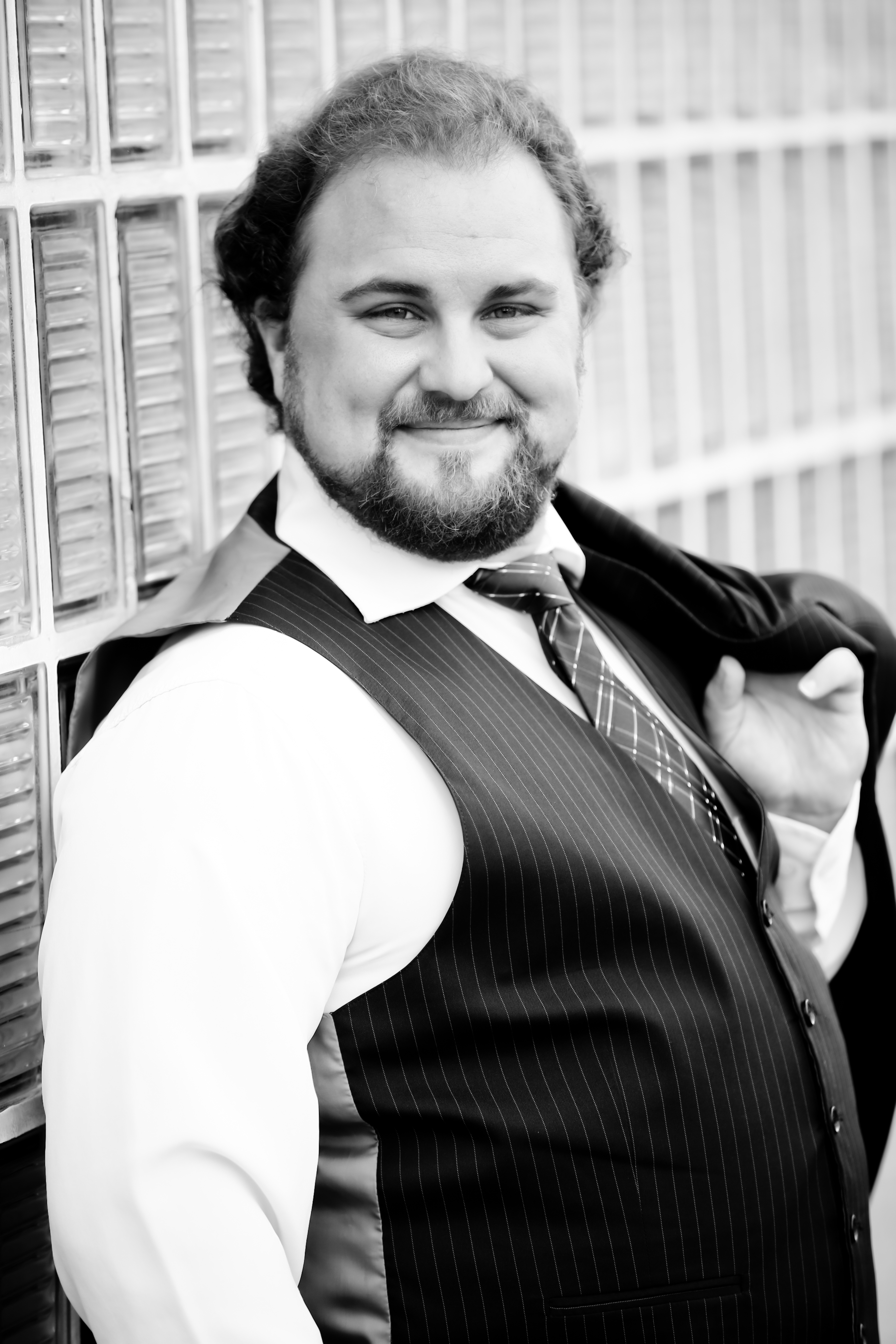 Dieses Bild zeigt den Tenor Maximilian Lütgendorff 2015